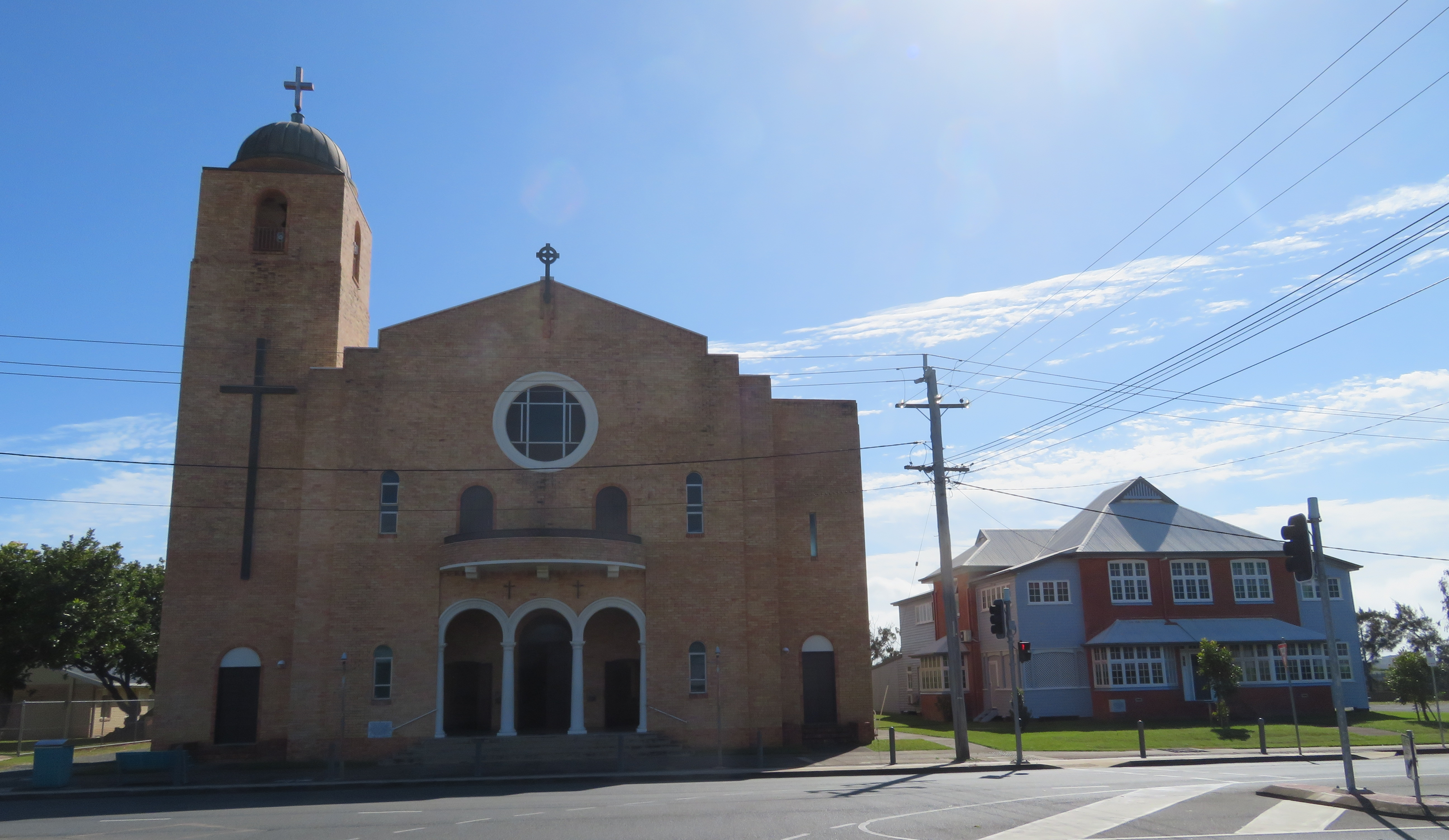 Mackay St.Patrick Church, Australien